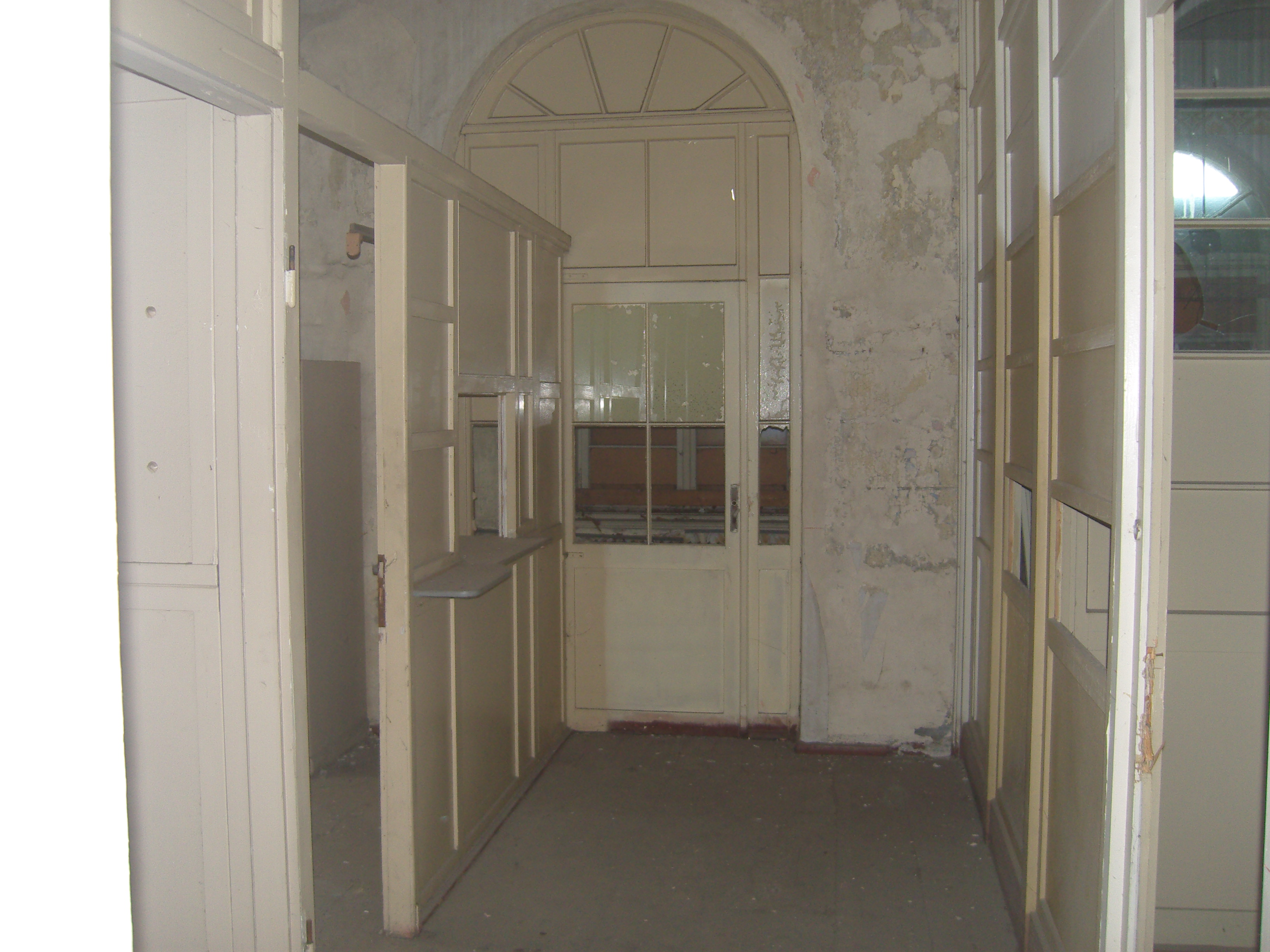 Räume im Erdgeschoss von Schloss Übigau - als Lohnbuchhaltung genutzt